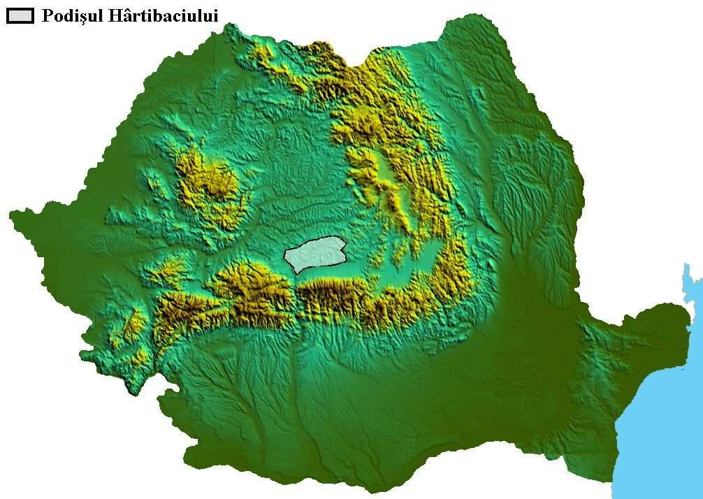 Podisul Hartibaciului